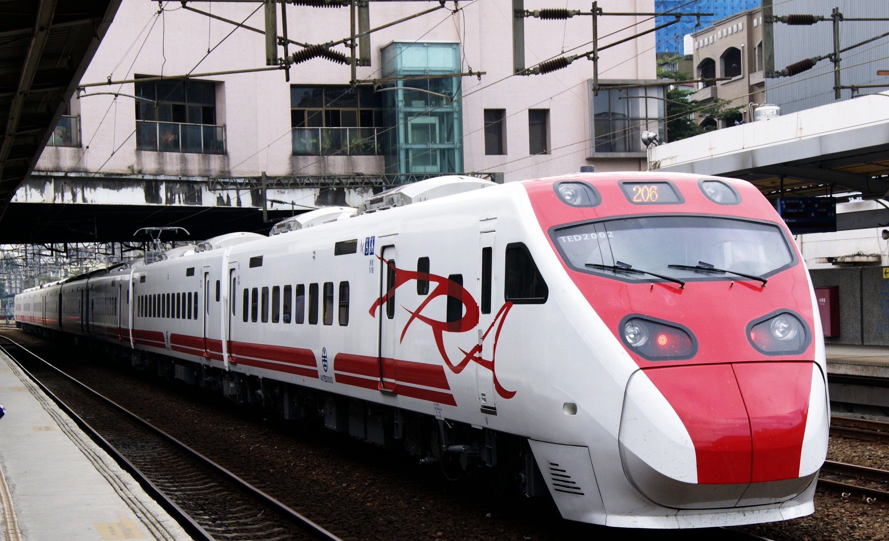 臺灣鐵路管理局TEMU2000型電聯車TED2002試運轉，停靠樹林車站休息。